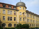 Fachhochschule Wuerzburg-Schweinfurt Hauptgebaeude in Wuerzburg (Münzstr.)